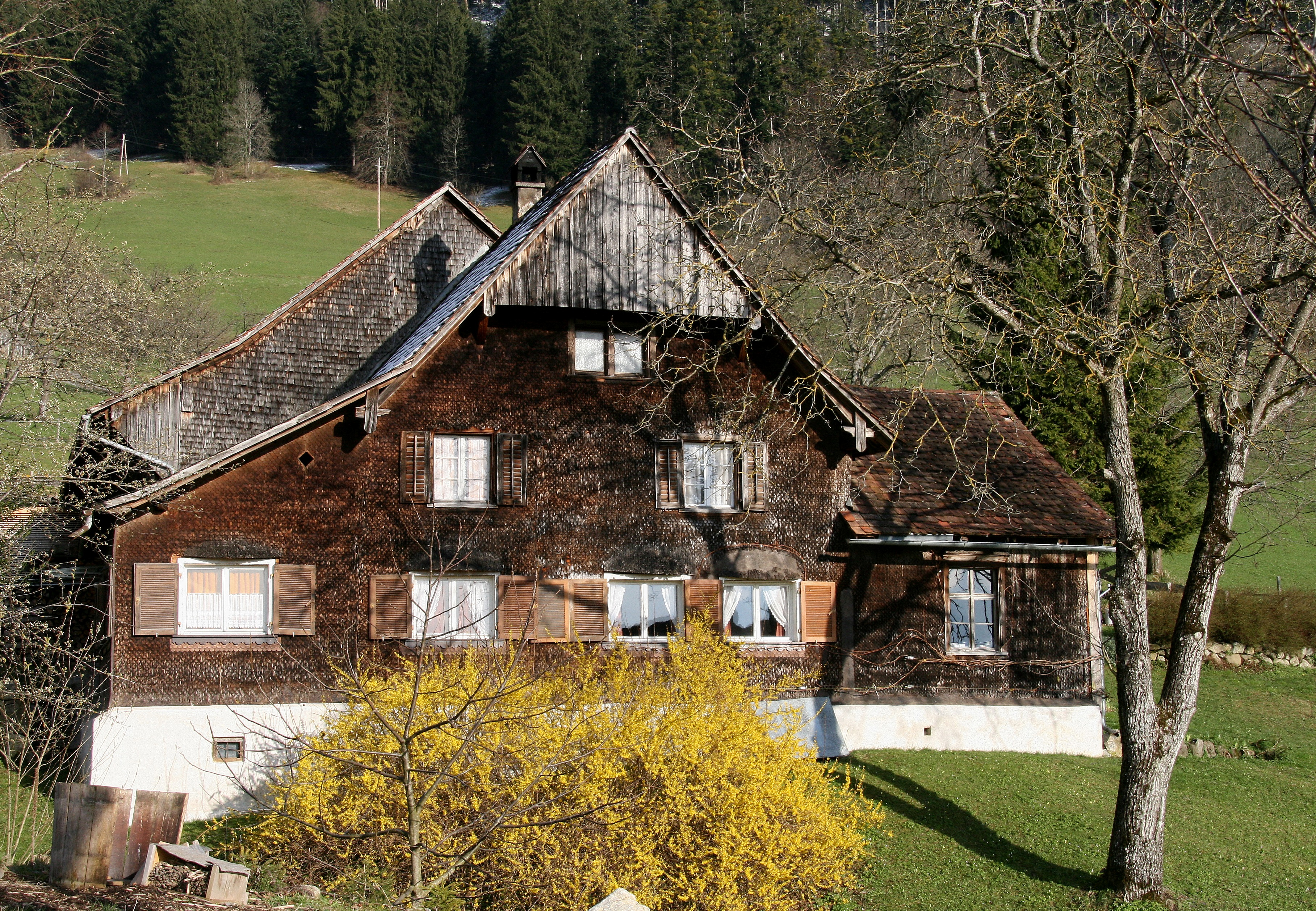 aus dem DEHIO Vorarlberg 1983: Götzner Berg, Nr.49,51,hier 54,56,58: Geschlossene Gruppe von Bauernhöfen vom Typus des Rheintalhauses, Einhöfe mit Mitteltenne, 18 Jh.(?), Wohnteile Blockbau mit Kopfstrick, verschindelt, z.T. mit traufseitigem Stüble und mit Schopf.*** In Götzis, Vorarlberg.